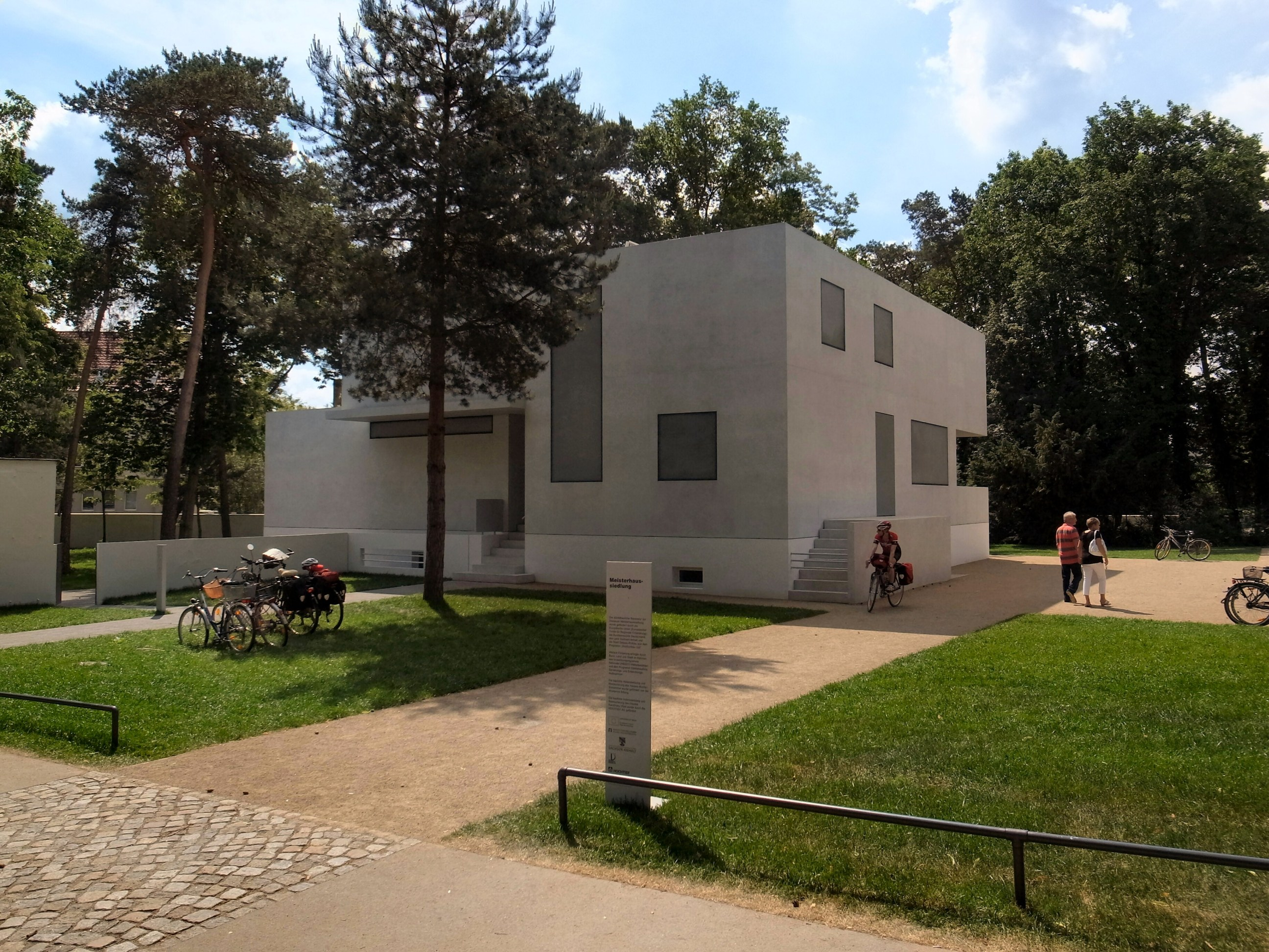 Dessau Meisterhaussiedlung. Haus Gropius, 2012-2014 rekonstruiertes Meisterhaus.